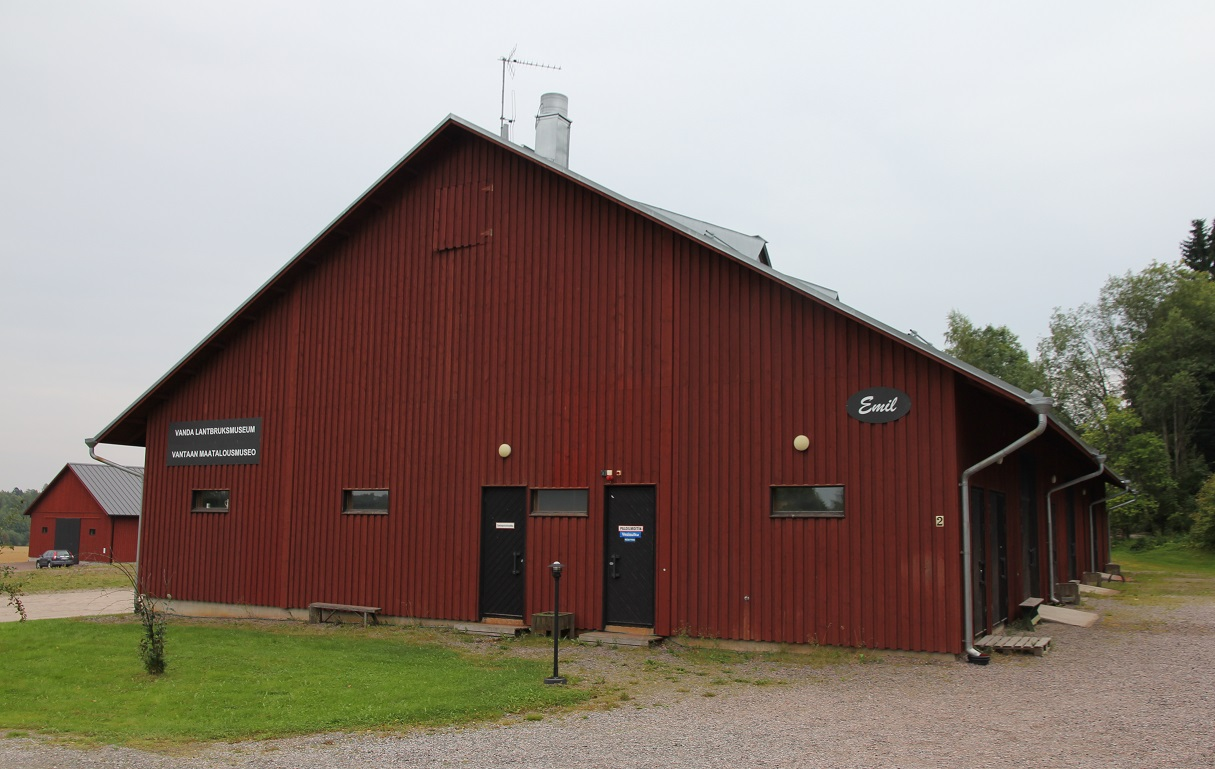 Vantaan maatalousmuseon rakennus, Vantaanlaakso, Vantaa.